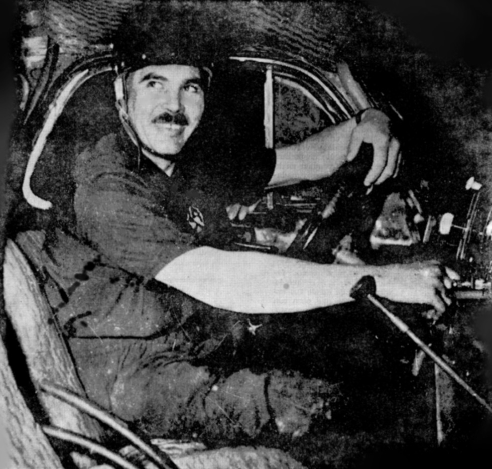 Eusebio Marcilla en febrero de 1953, en el taller mecánico ubicado en la avenida Julio A. Roca (hoy avenida Benito de Miguel) entre Ataliva Roca y Urquiza, en Junín, Argentina.